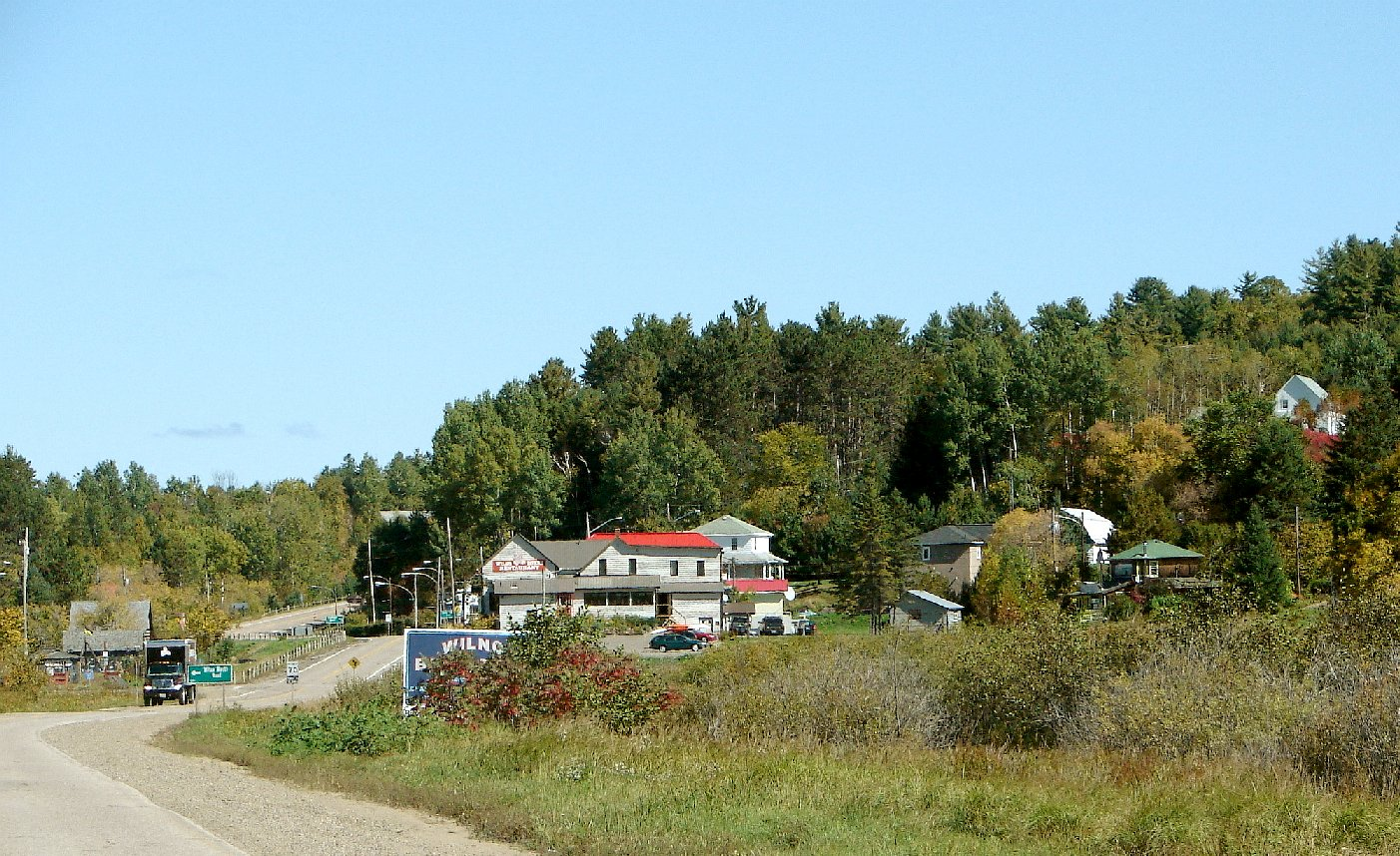 Wilno, Ontario, Canada